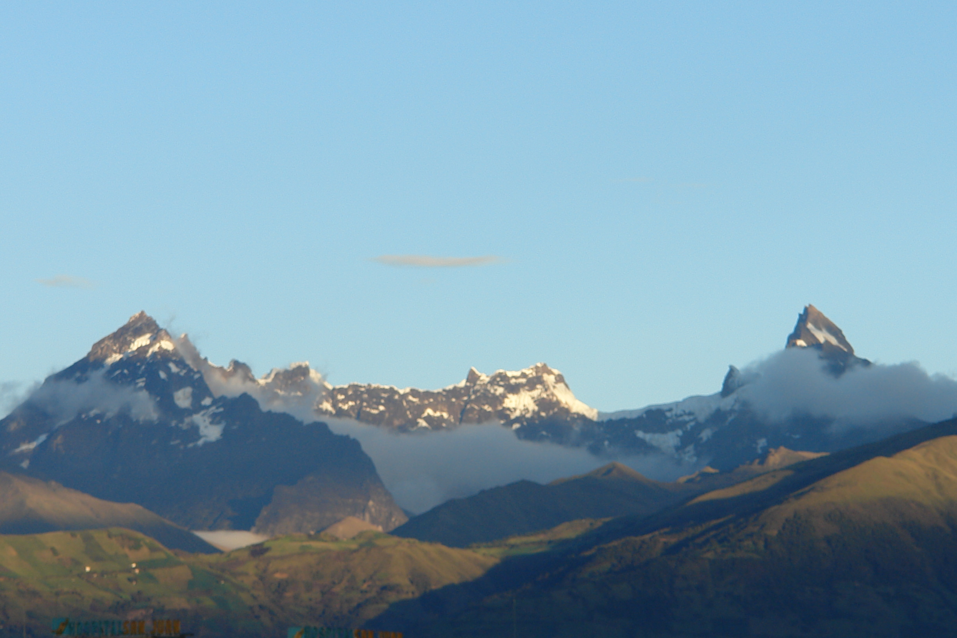 Volcán el Altar Fecha: 2006 Autor: Alfredobi